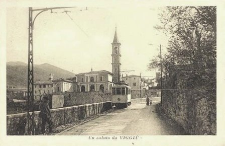 Viggiù, saluti.JPG